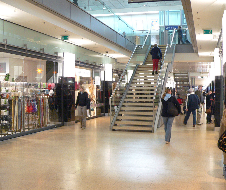 Niki-de-Saint-Phalle-Promenade Hannover, unter dem Bahnhof Foto aufgenommen von Benutzer User:AxelHH, Oktober 2006